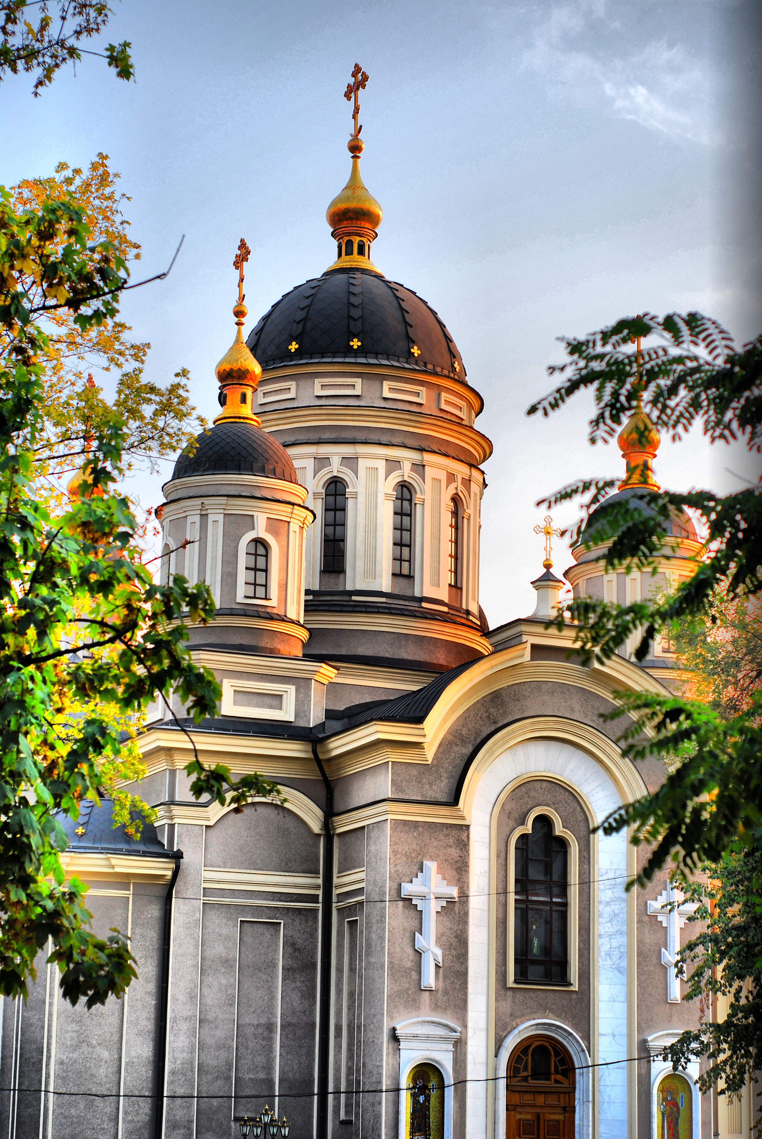 Свято-Преображенский кафедральный собор (Донецк)